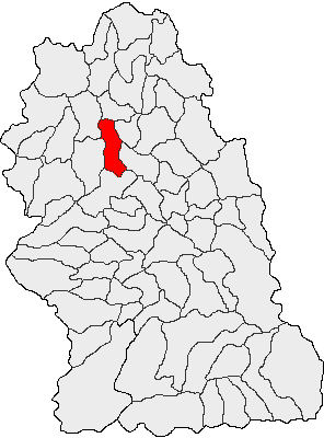 Categorie:Hărţi ale judeţului Hunedoara